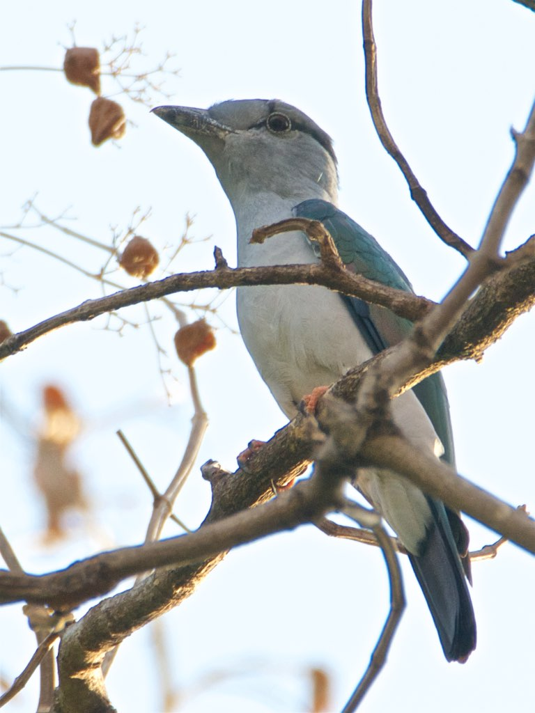 Madagascar Cuckoo-Roller